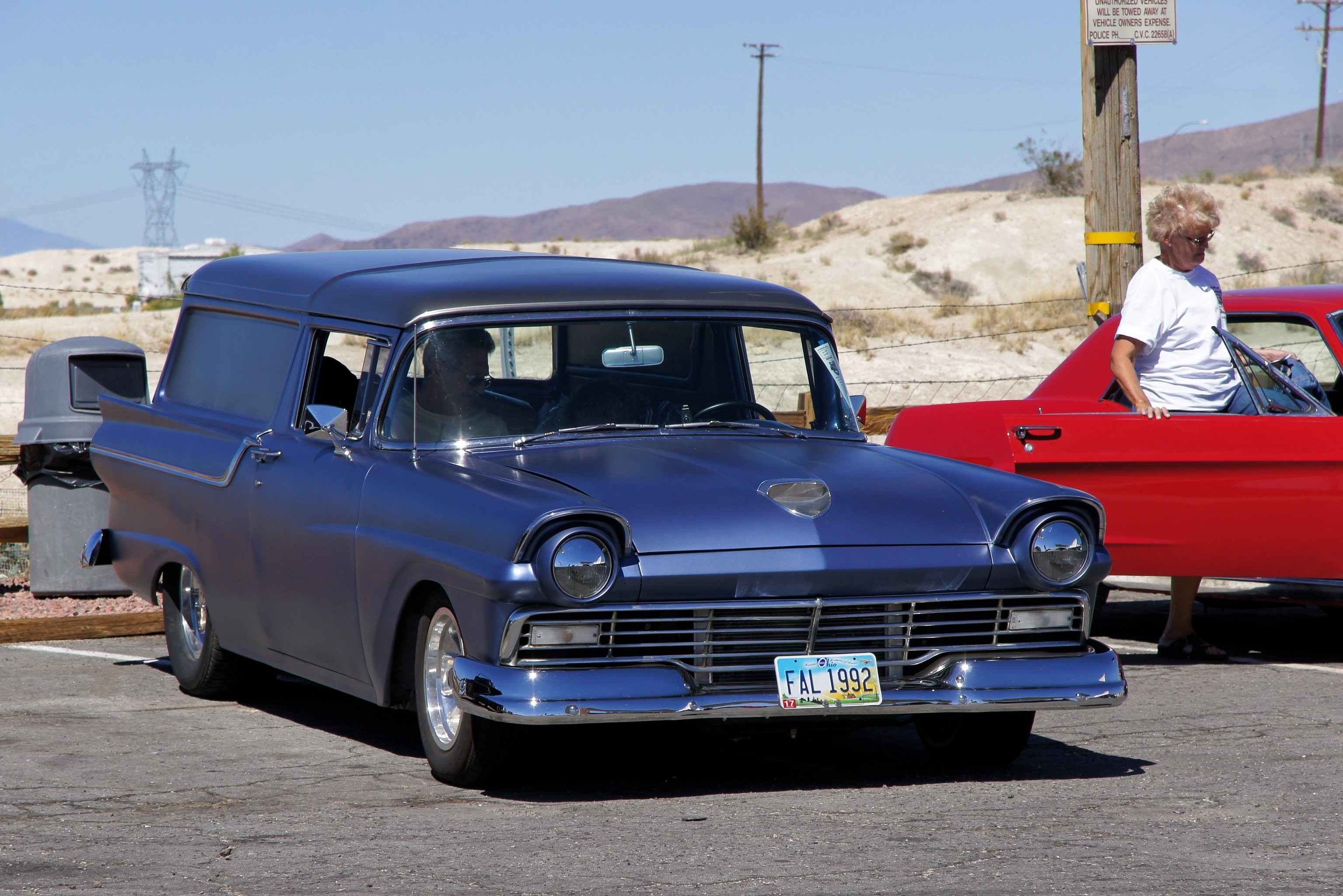 1957 Ford Courier. Une belle et ancienne voiture américaine.